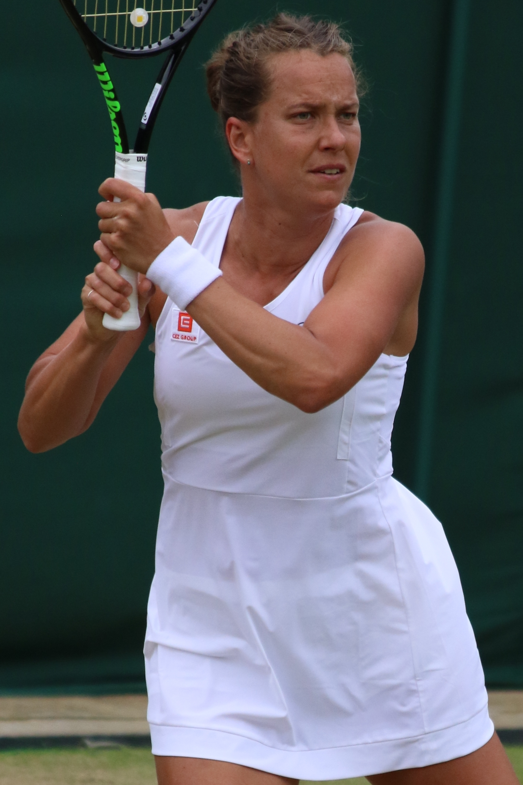 Strycova WM19 (47)